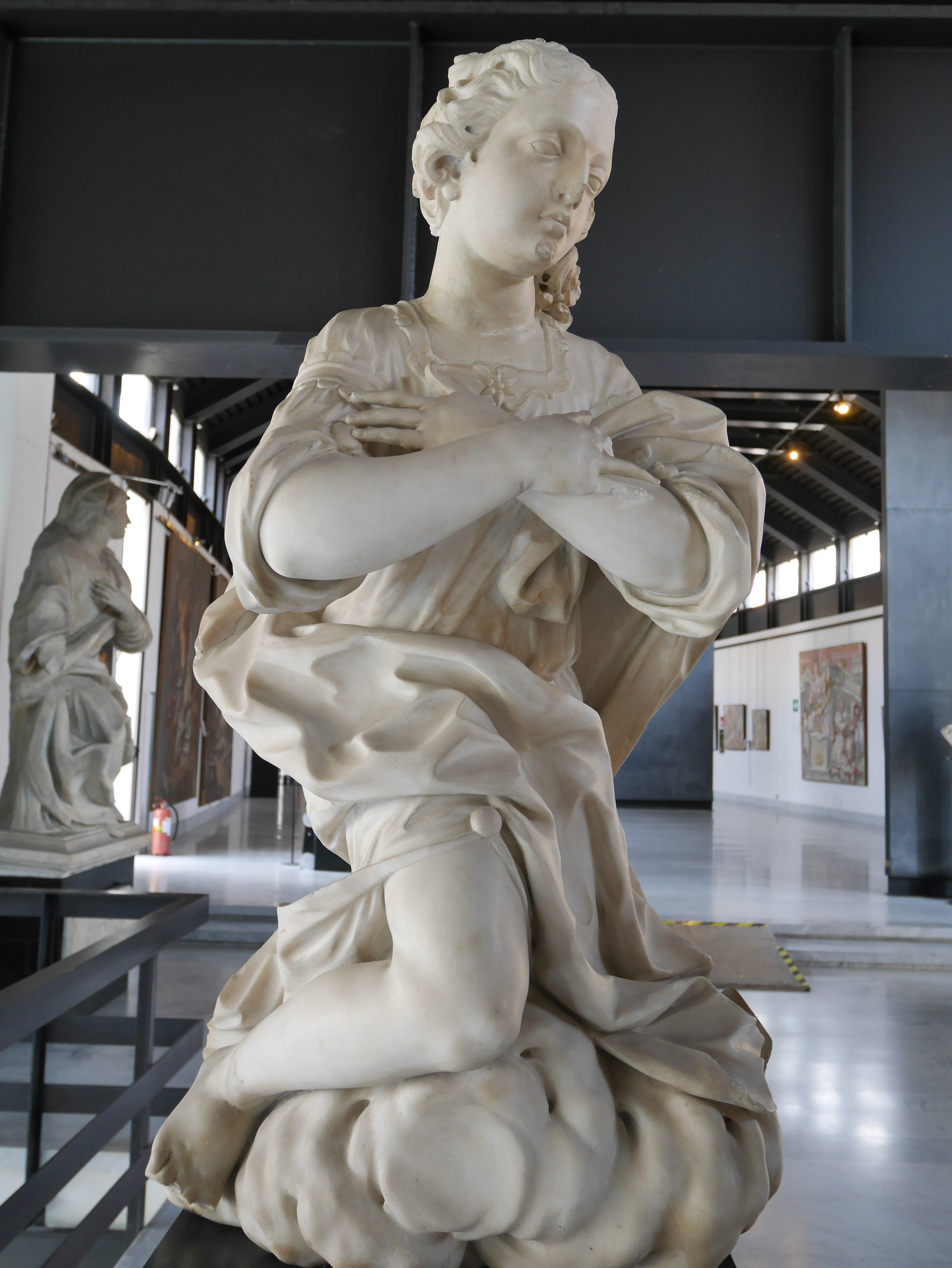 Museo di Sant'Agostino di Genova This is a photo of a monument which is part of cultural heritage of Italy.